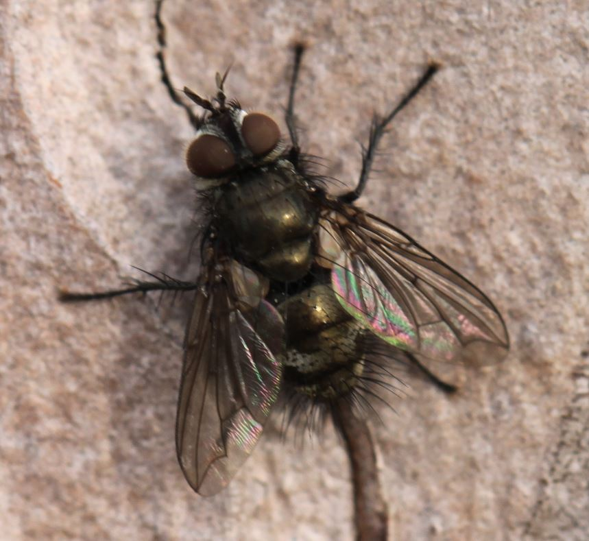 Kirbya moerens am 24.03.2017 in der Schwetzinger Hardt